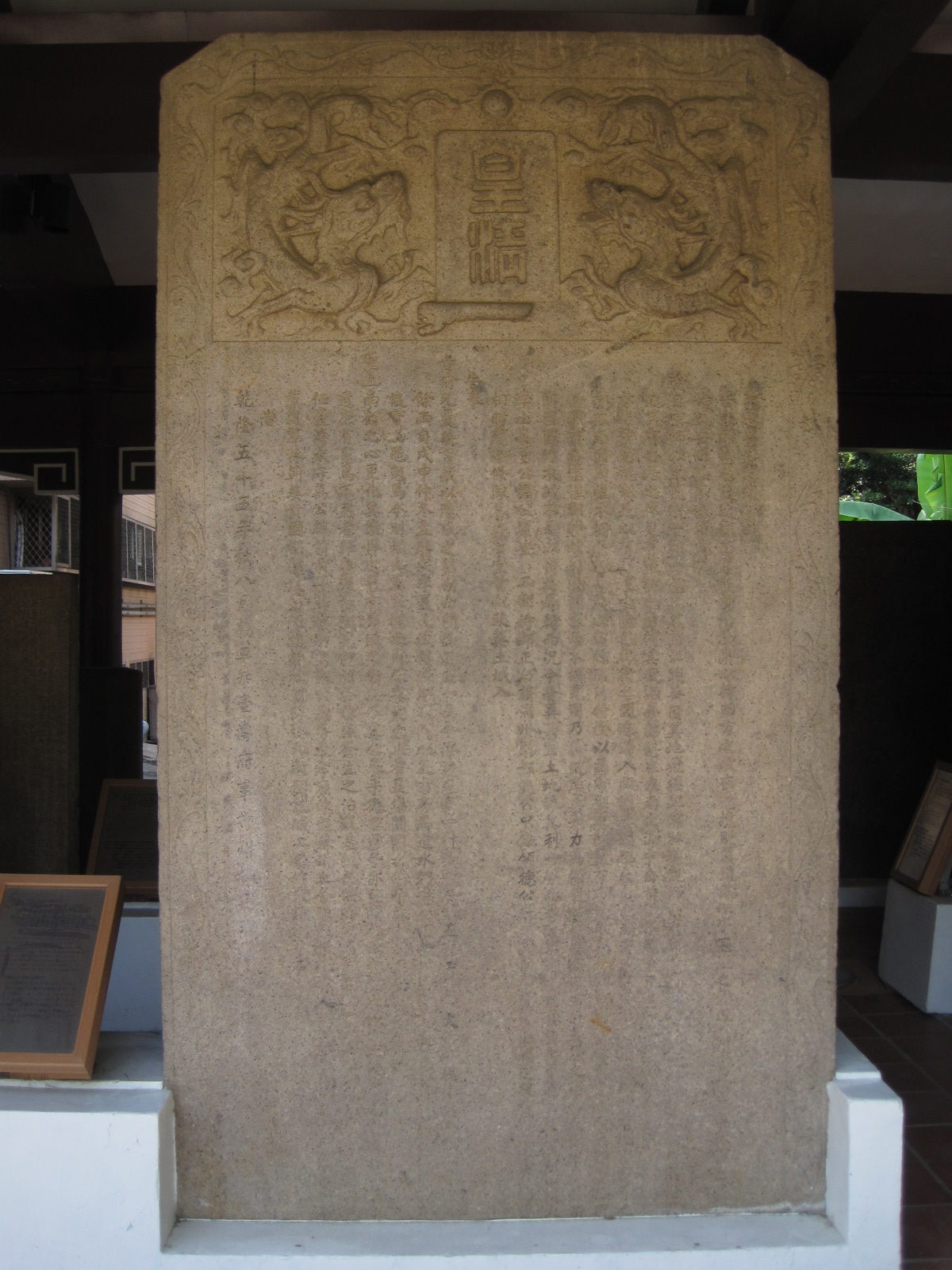 臺灣臺南市南門公園碑林石碑之一